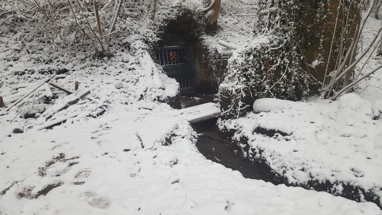 Außenansicht des Mundloch Süd des Harrl Stollen im Winter des Jahres 2017